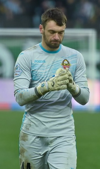 Евгений Паст - украинский футболист, вратарь